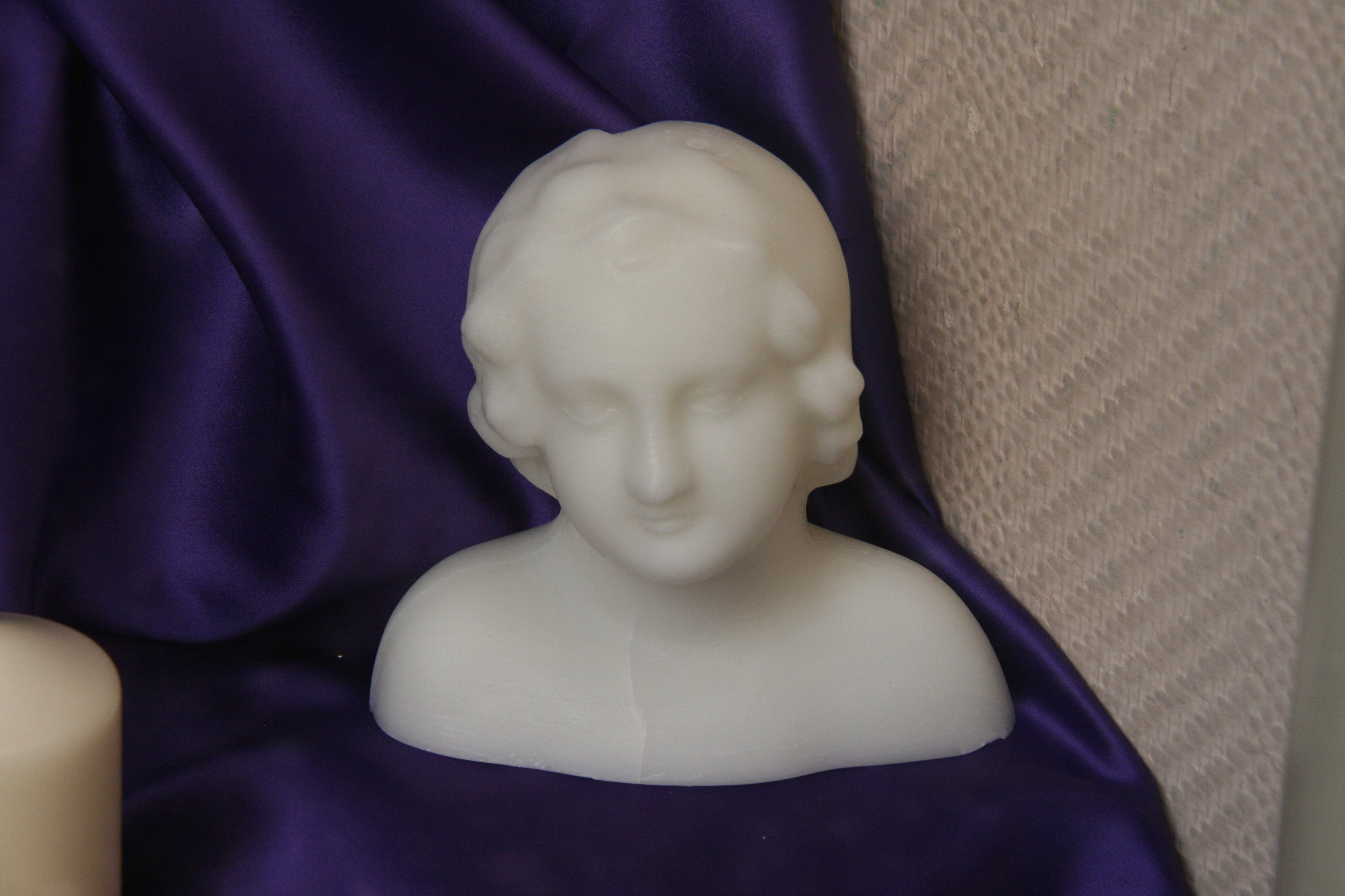 Ex voto de cabeza